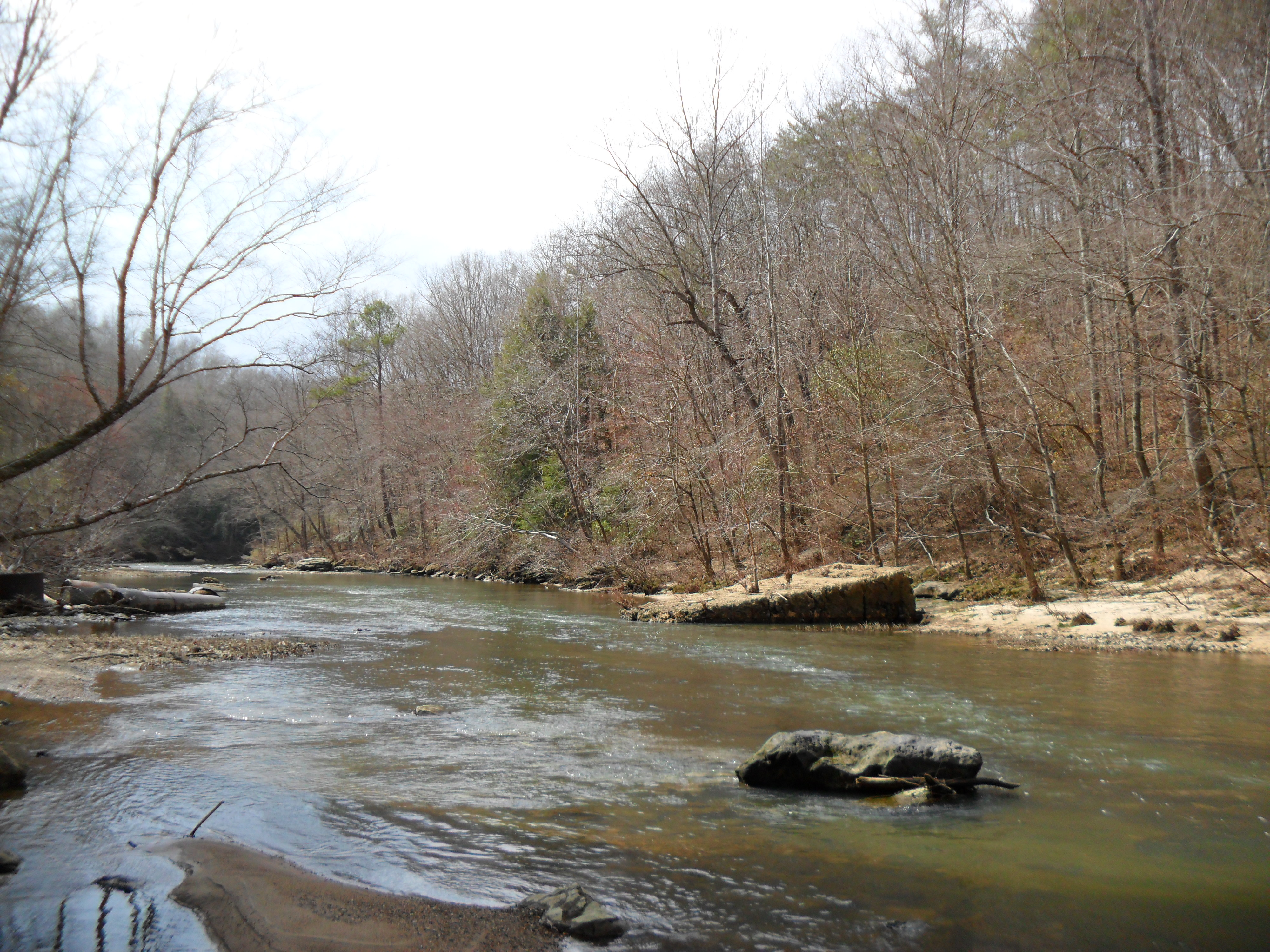 Bear Creek